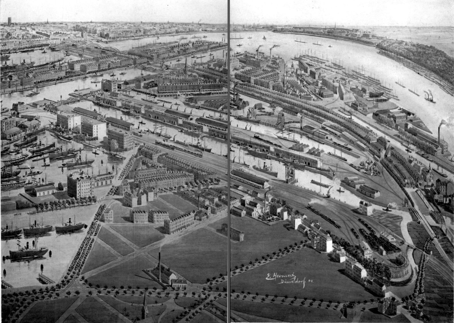 Panorama van een deel van de Linker Maasover met Fijenoord door E. Hesmert, 1904